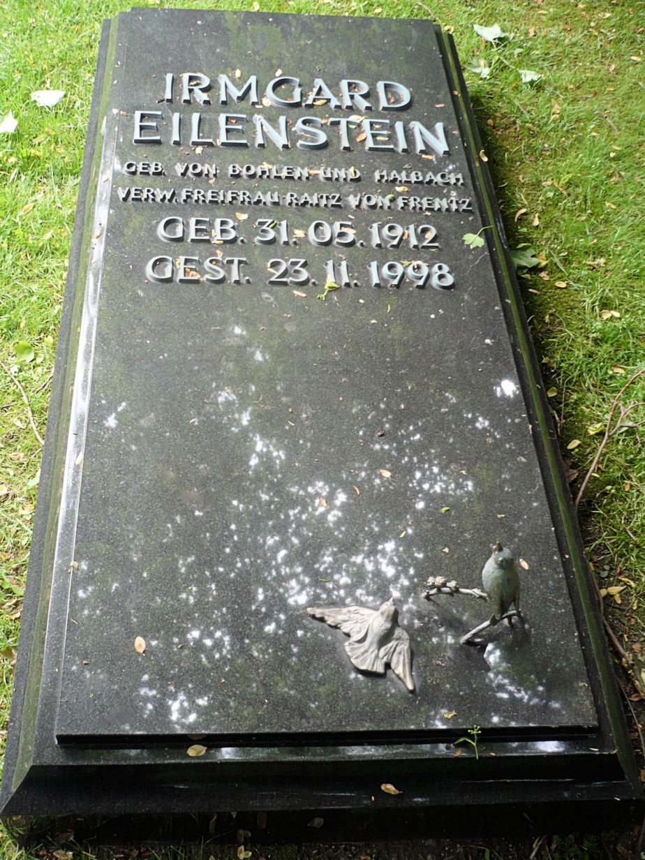 Grabplatte von Irmgard geb. von Bohlen und Halbach, verwitwete Freifrau Reitz von Frentz auf dem Krupp-Familienfriedhof Essen-Bredeney